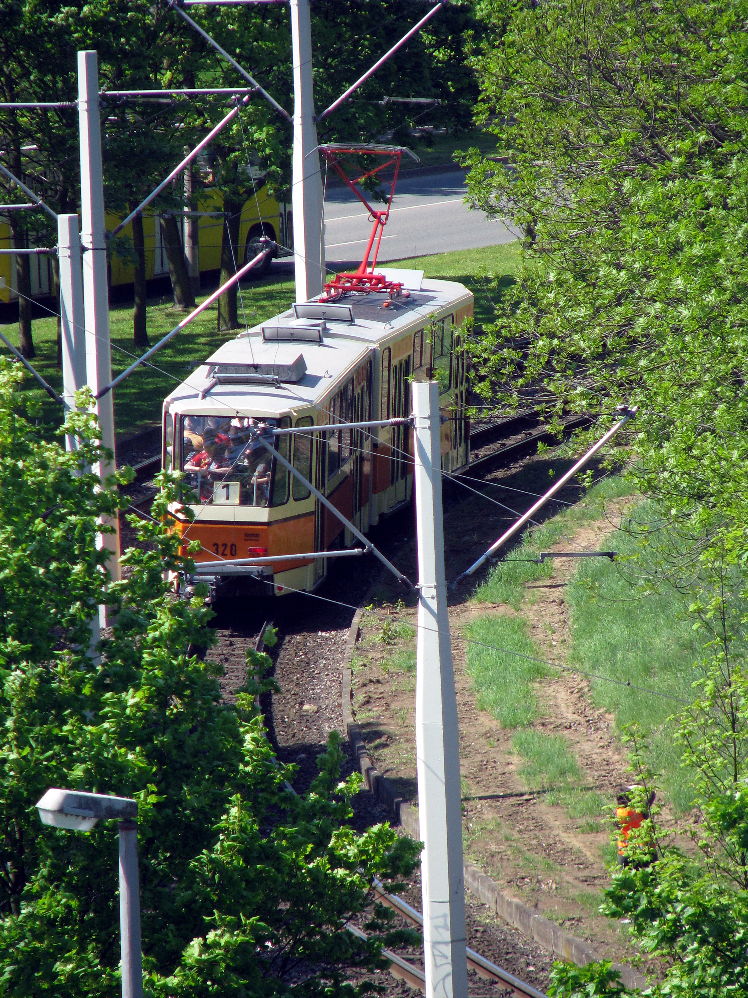 Tatra KT4D Nr. 320 (Baujahr 1979) im traditionellen Orange